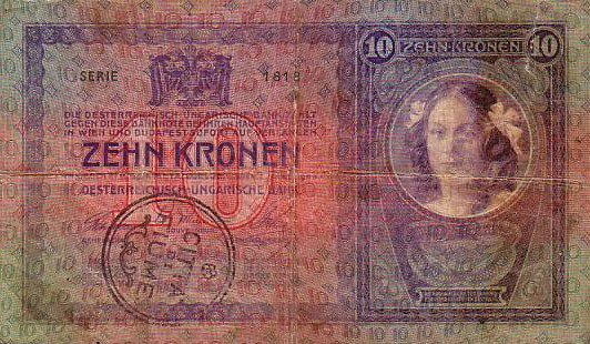 10 австро-венгерских крон с надпечаткой "Фиуме"